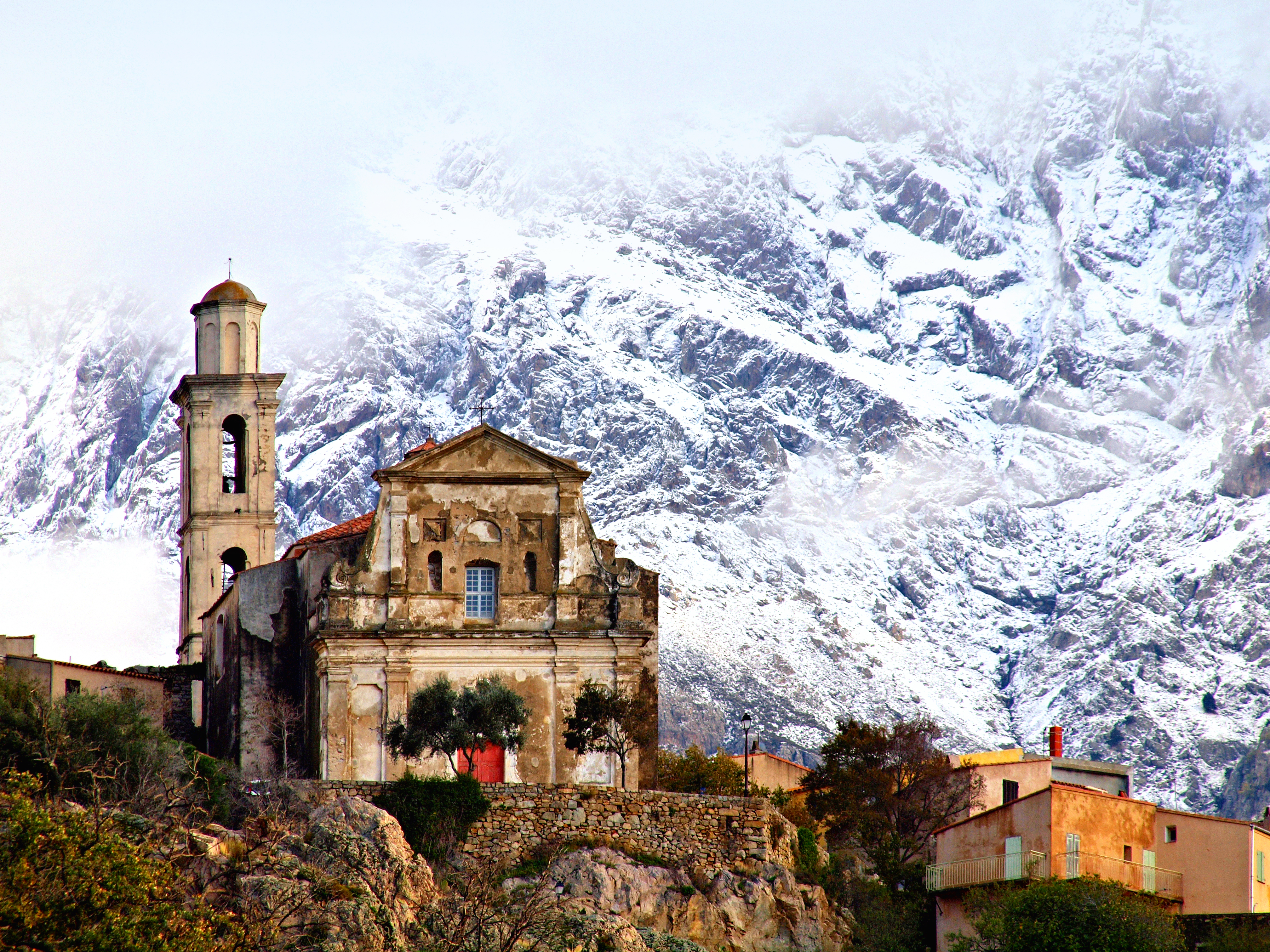 Montegrosso, Balagne (Haute-Corse) - Église St-Augustin de Montemaggiore